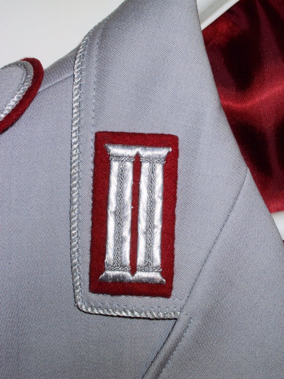 Kragenspiegel eines Artillerieoffiziers der Bundeswehr, selbst aufgenommen, FDL Die Waffenfarbe wiederholt sich als Unterlage des Schulterstückes. Die Fütterung der Uniformjacke in der Waffenfarbe ist eine private Extravaganz.